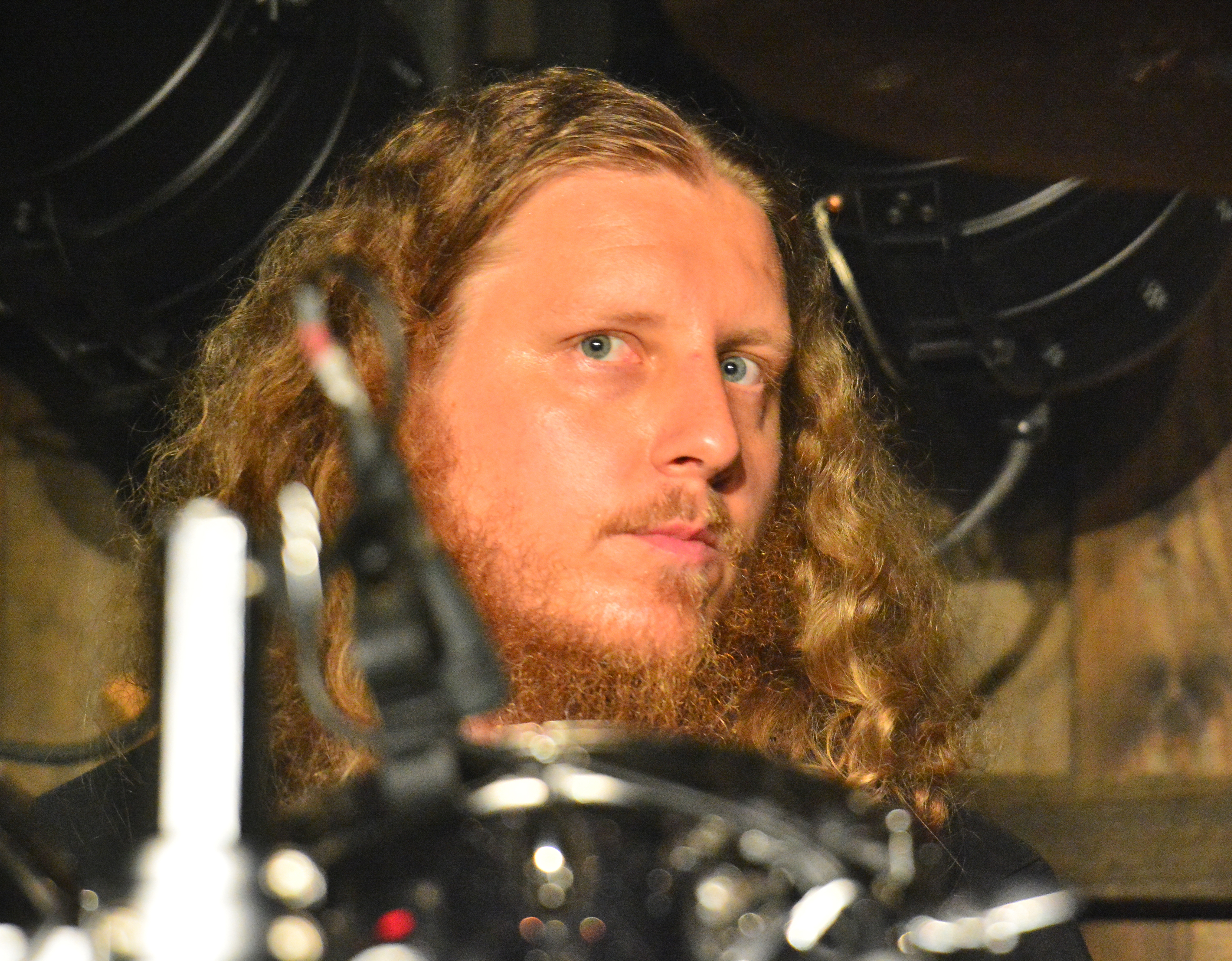 Ludwig Witt von Grand Magus und Spiritual Beggars beim Headbangers Open Air 2014